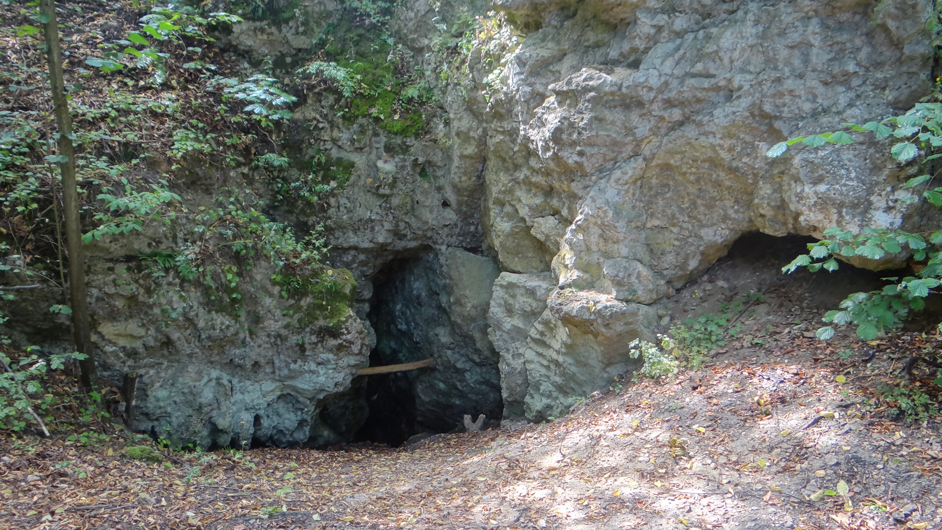 Jaskinia Pochylnia Lewej Nogi Baby w skałach Dudnik w Podlesicach